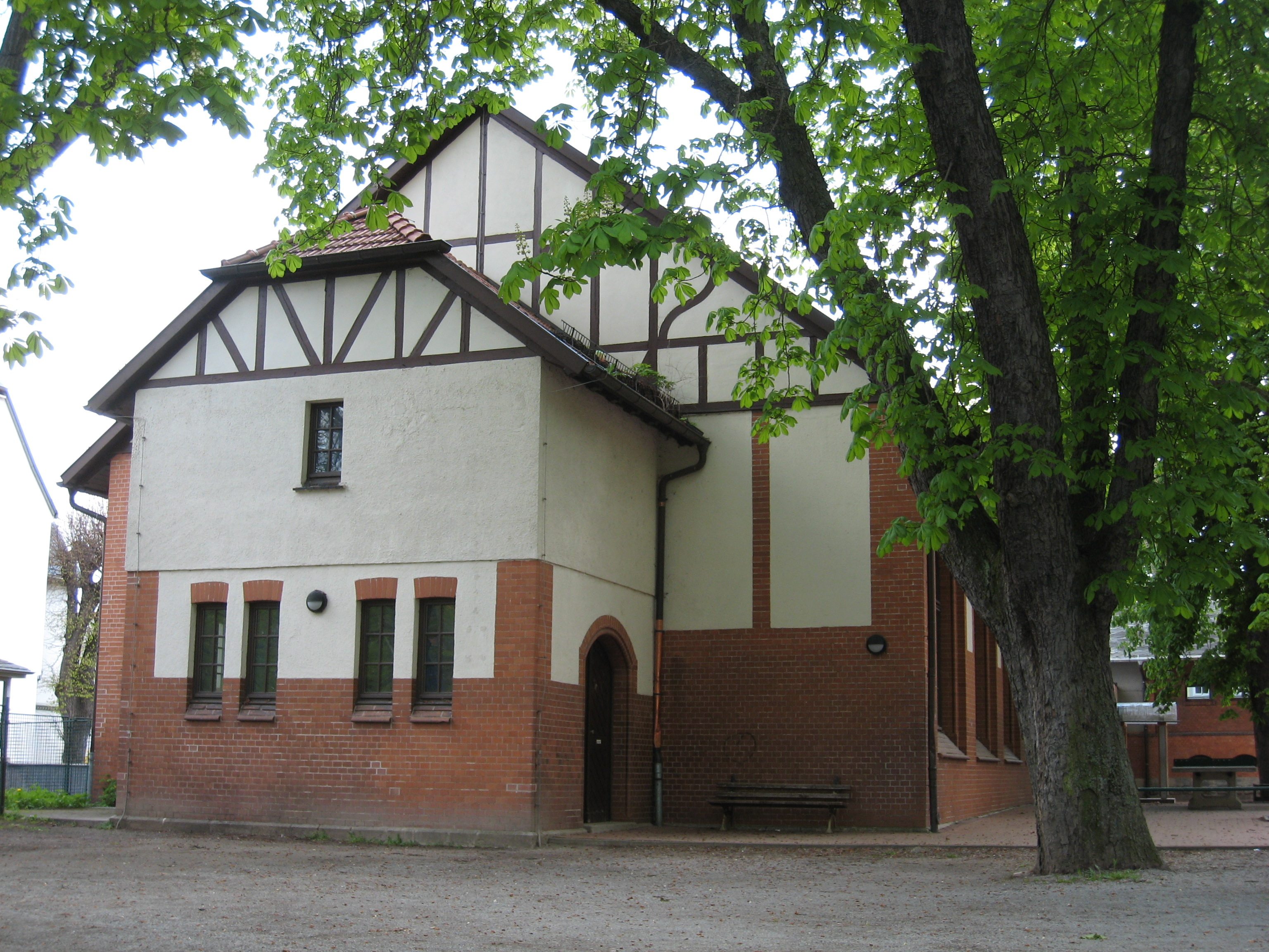 Sporthalle der Emil-Petri-Schule in Arnstadt.